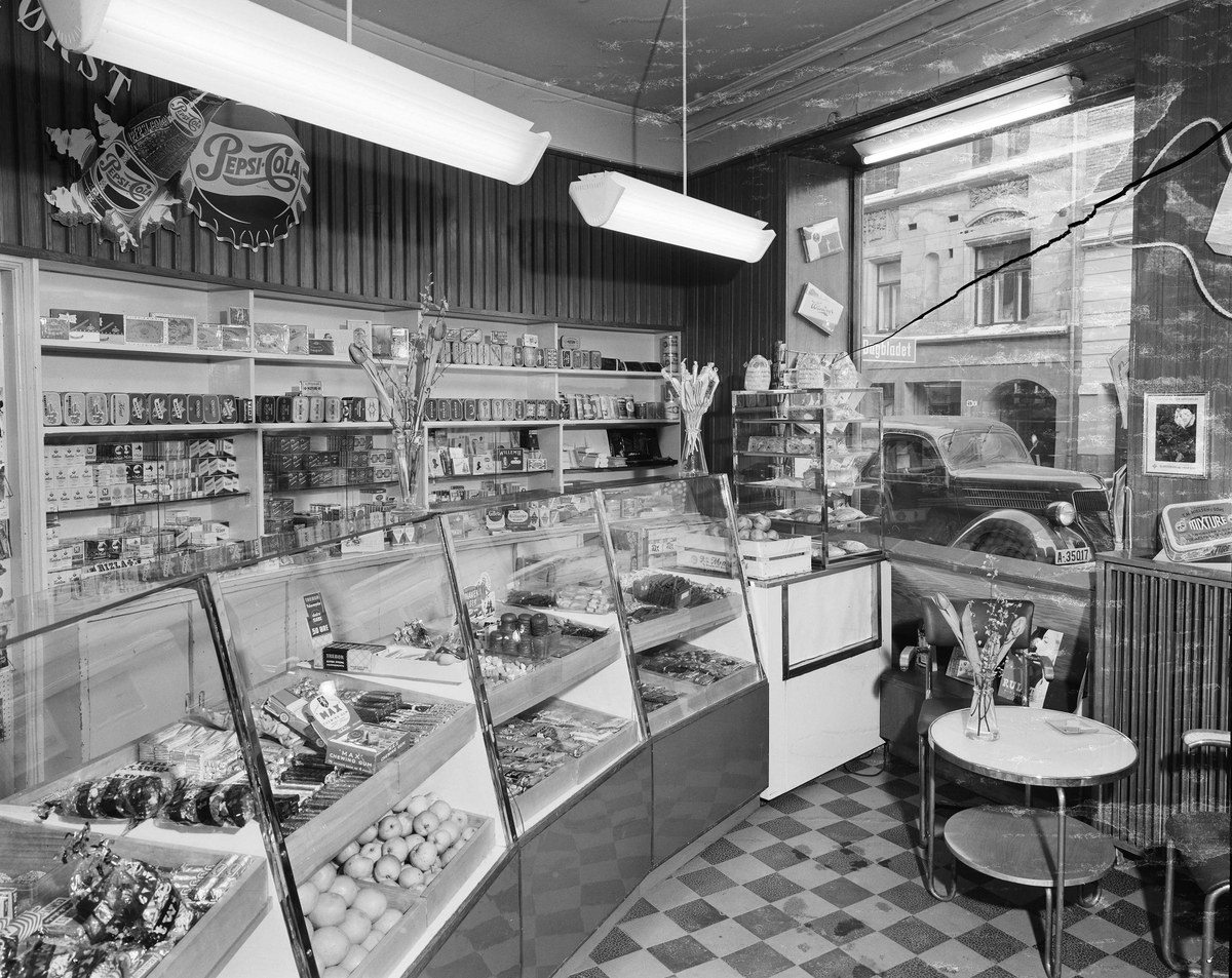 Interiør i Oslo samvirkelag avd. 34, Bogstadveien 62. Gjennom vinduet ses fasaden til Bogstadveien 49 (Bogstadveiens kapell). Foto: Leif Ørnelund, 6. februar 1959. Fra Byhistorisk samling hos Oslo Museum.